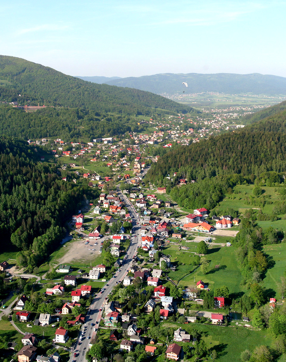 Widok na Szczyrk z lotu ptaka